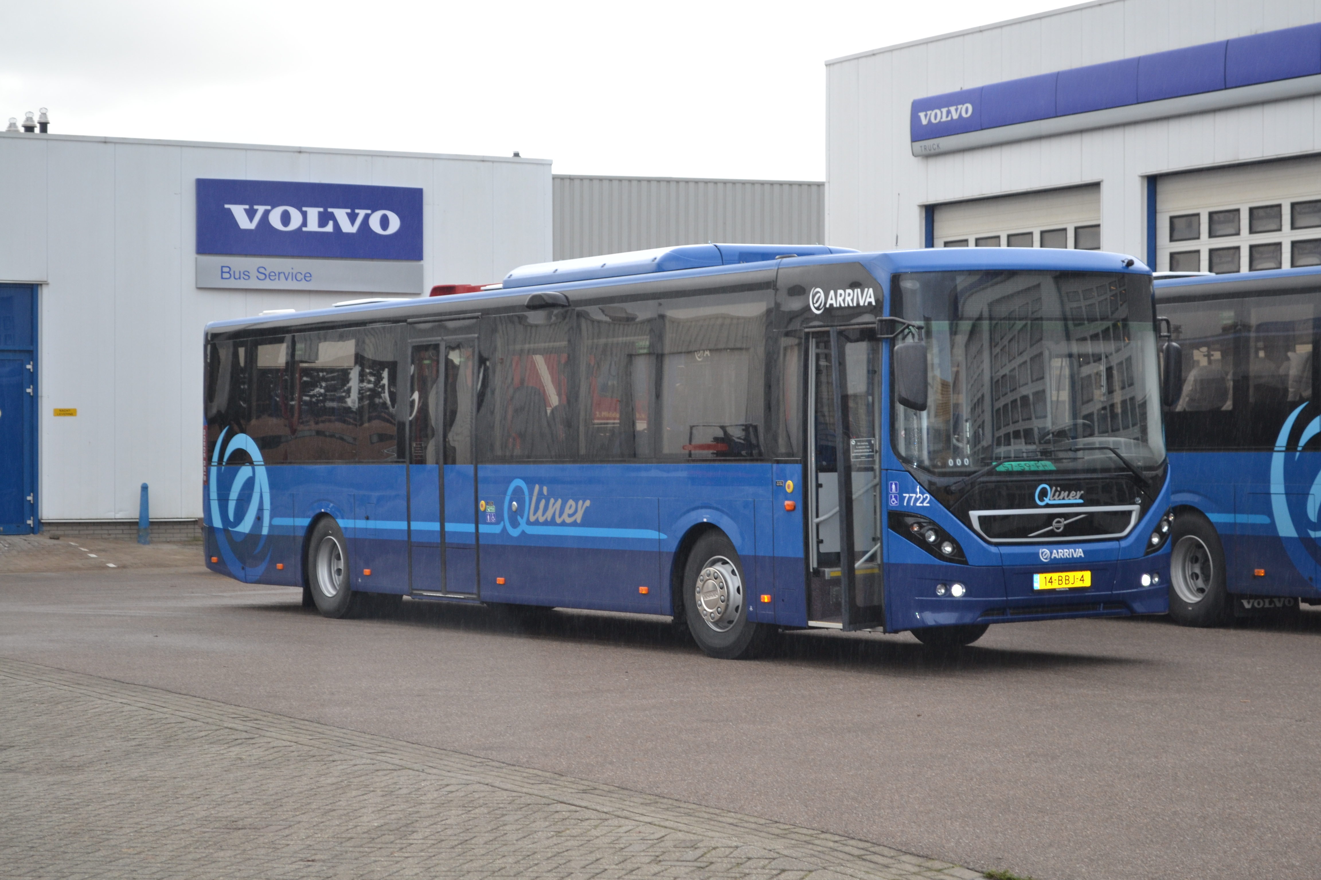 Volvo 8900 in Arriva Qliner-huisstijl bij Volvo Trucks & Buses in Alphen aan den Rijn